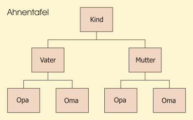 Ahnentafel